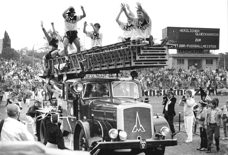 ADN-ZB-Häßler- 3-6-89-ba-Dresden: Fußball-Oberliga- Dynamo Dresden Fußballmeister - Was seit Wochen Gewißheit war, wurde nach dem 5:0 Sieg über den 1. FC Union Berlin gebührend gefeiert - der wieder einmal in die Elbestadt geholte Meistertitel. Die Ehrenrunde vor den 27 000 Zuschauern, die zum Saisonausklang gekommen waren, wurde mit einer historischen Feuerwehr gedreht.